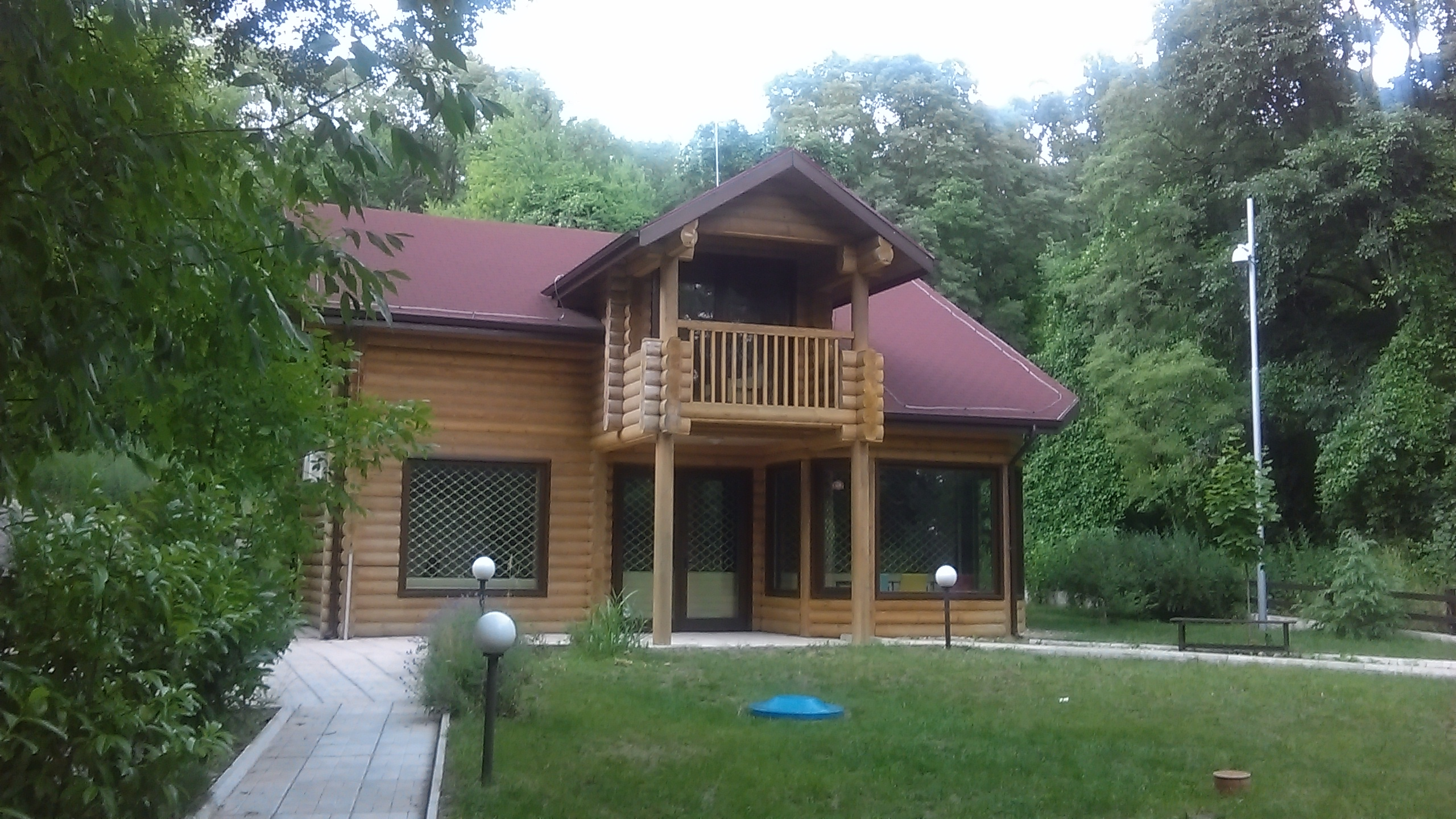 Изграден с фондове на ОП „Околна среда 2007-2013” заслон - туристически информационен пункт в местността „Аладжа манастир” в природен парк „Златни пясъци”